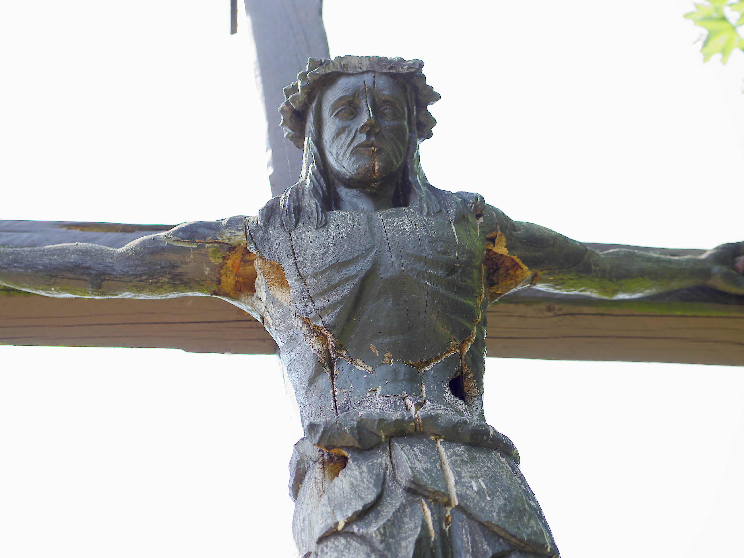 Das Wallfahrtkreuz von Georg Schröter von 1948 auf dem Kreuzweghügel des Klosters Neuzelle